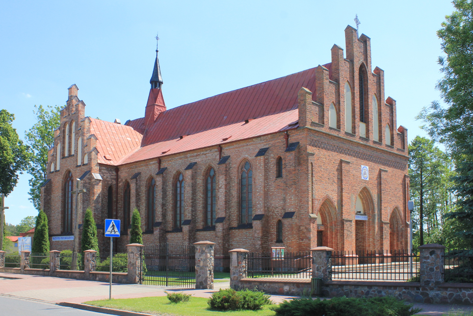 Zuzela - rzymskokatolicki kościół parafialny p.w. Przemienienia Pańskiego, 1908, 1957